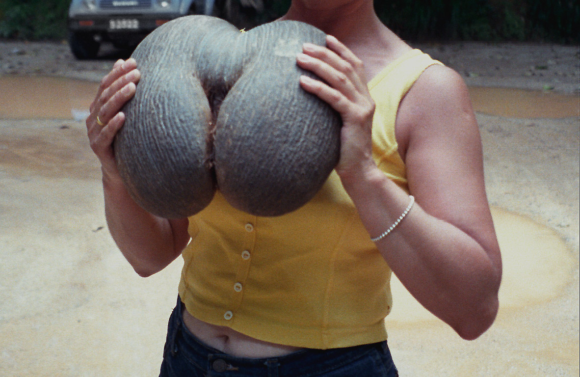 Owoc lodoicji seszelskiej. Owoce.